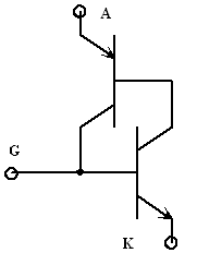 Schéma équivalent du thyristor et du GTO. auteur: ArséniureDeGallium 2005/11/08